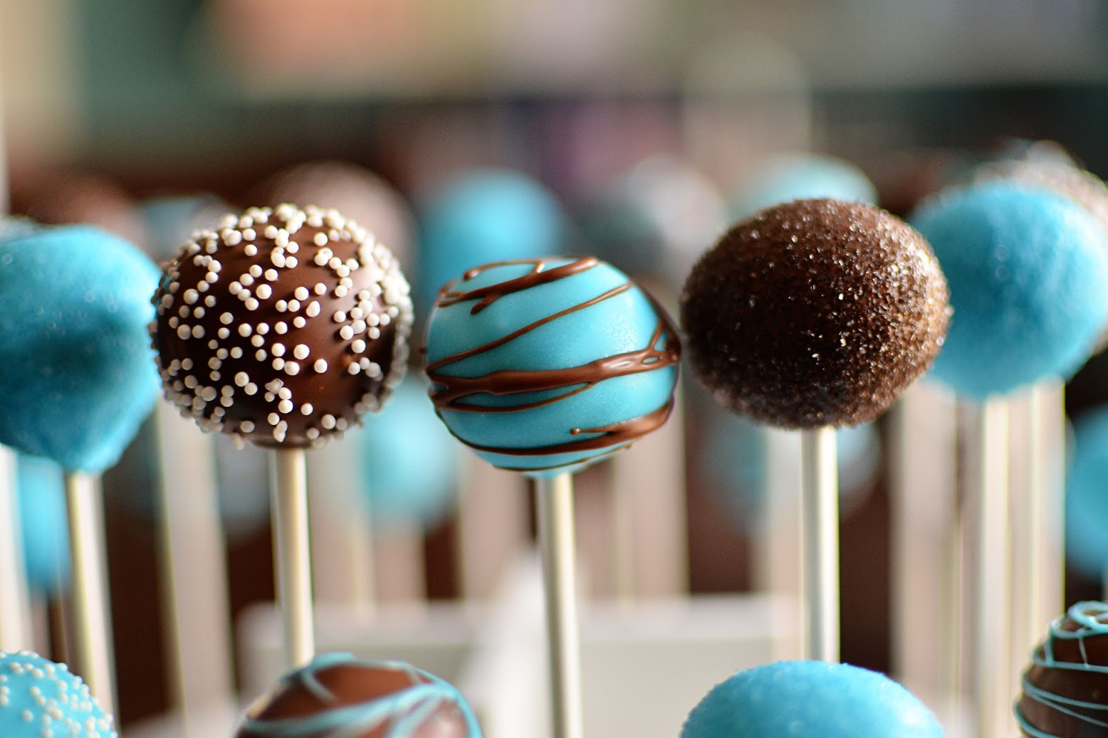 DSC_1911 copy